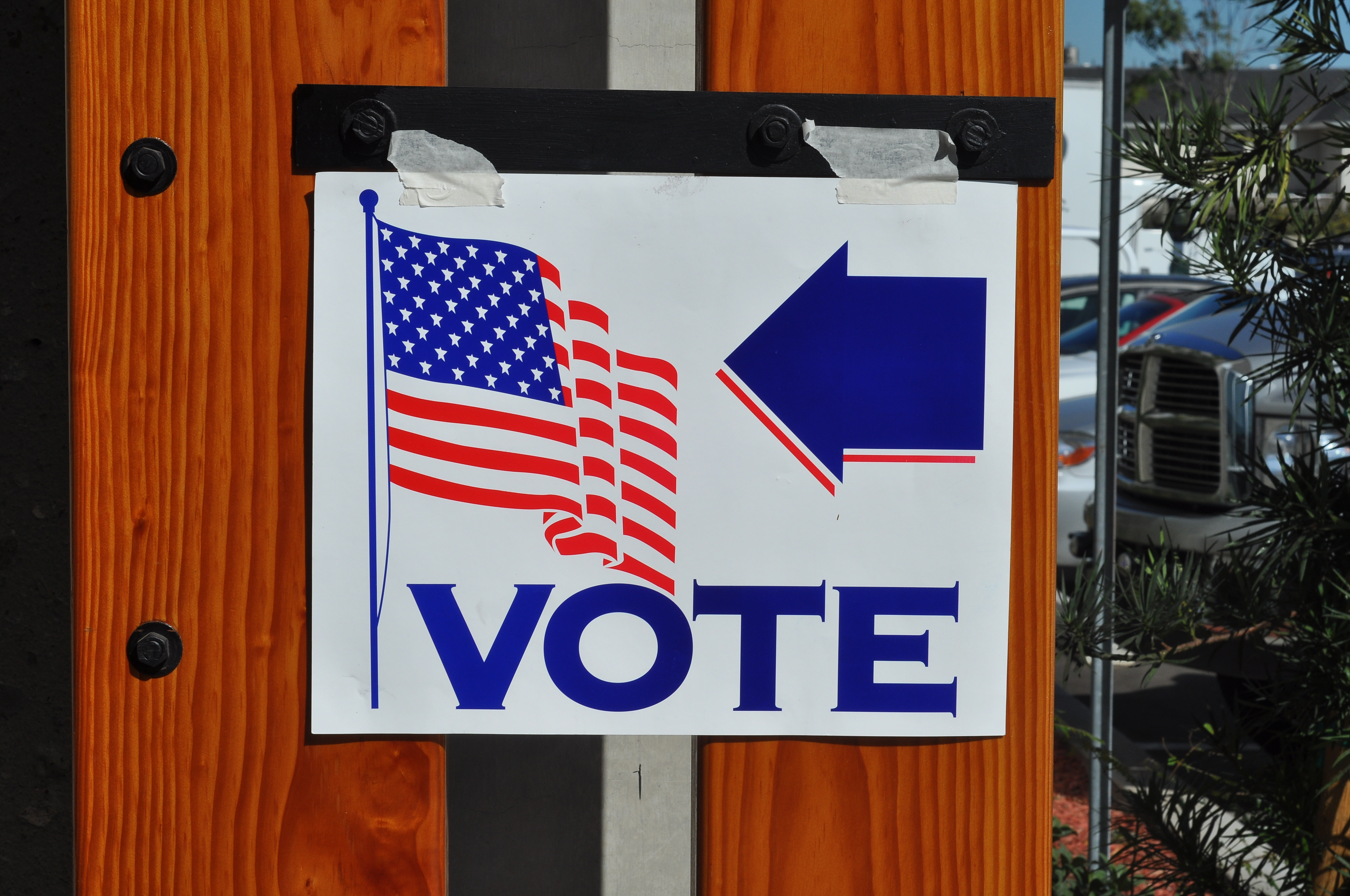 Señalización de lugar de votación en California. 2008.